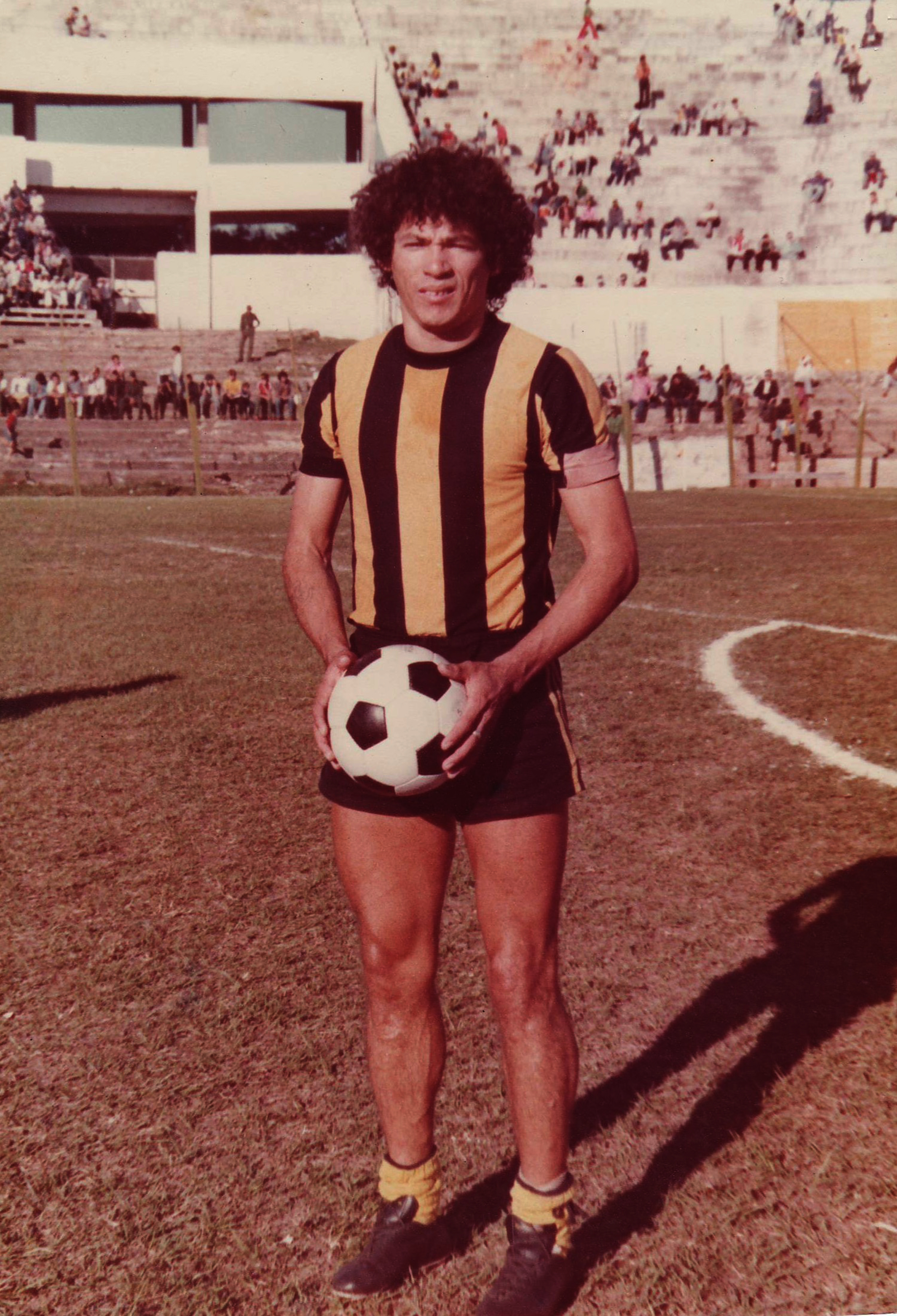 Cristino Centurion en su segunda etapa en el Club Guarani fotografiado como capitan